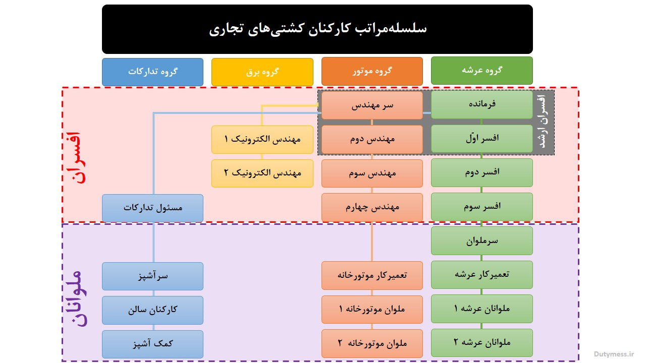 سلسله مراتب کارکنان کشتی های تجاری